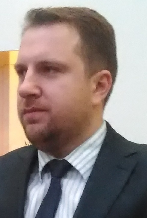 Gradonačelnik Sarajeva, Abdulah Skaka